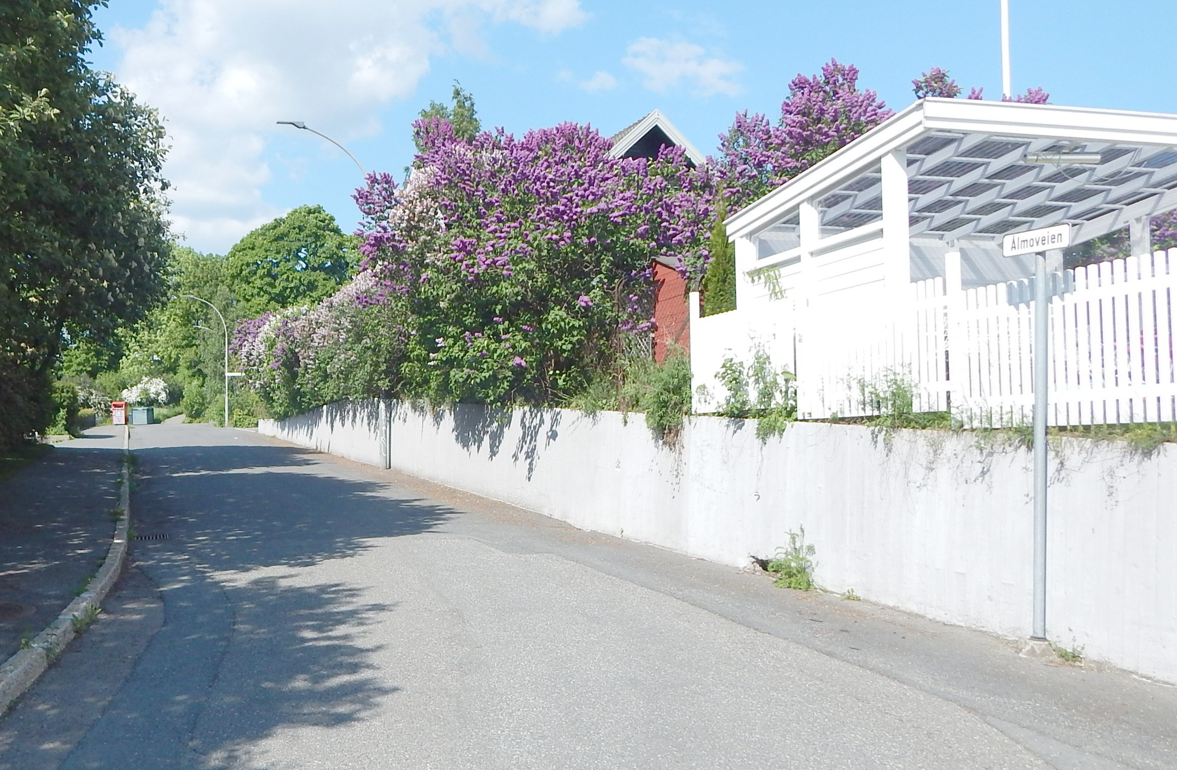 Ålmoveien